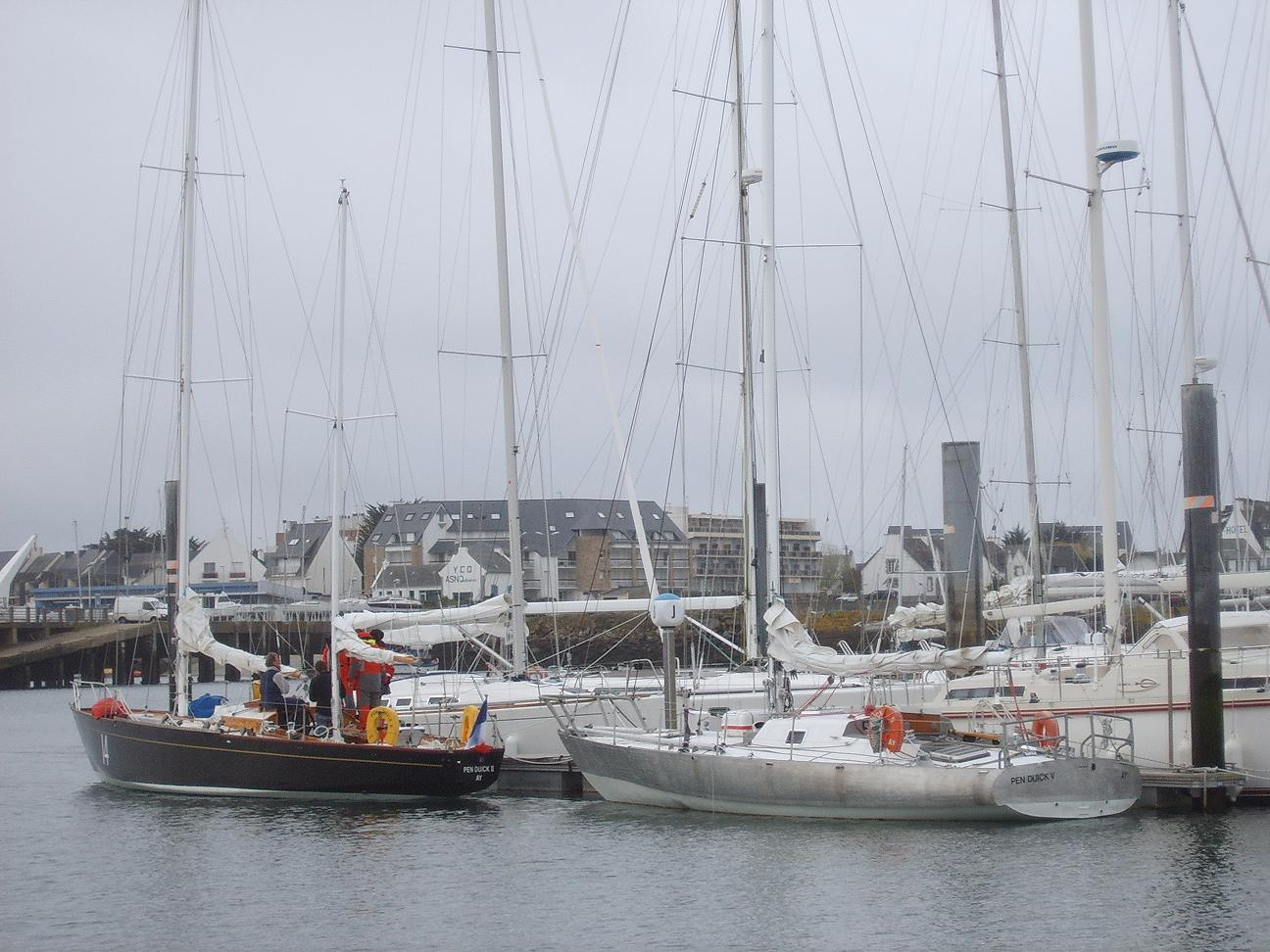 Deux des Pen Duick (II et V), bateaux d'Éric Tabarly, à Port Haligen, Quiberon